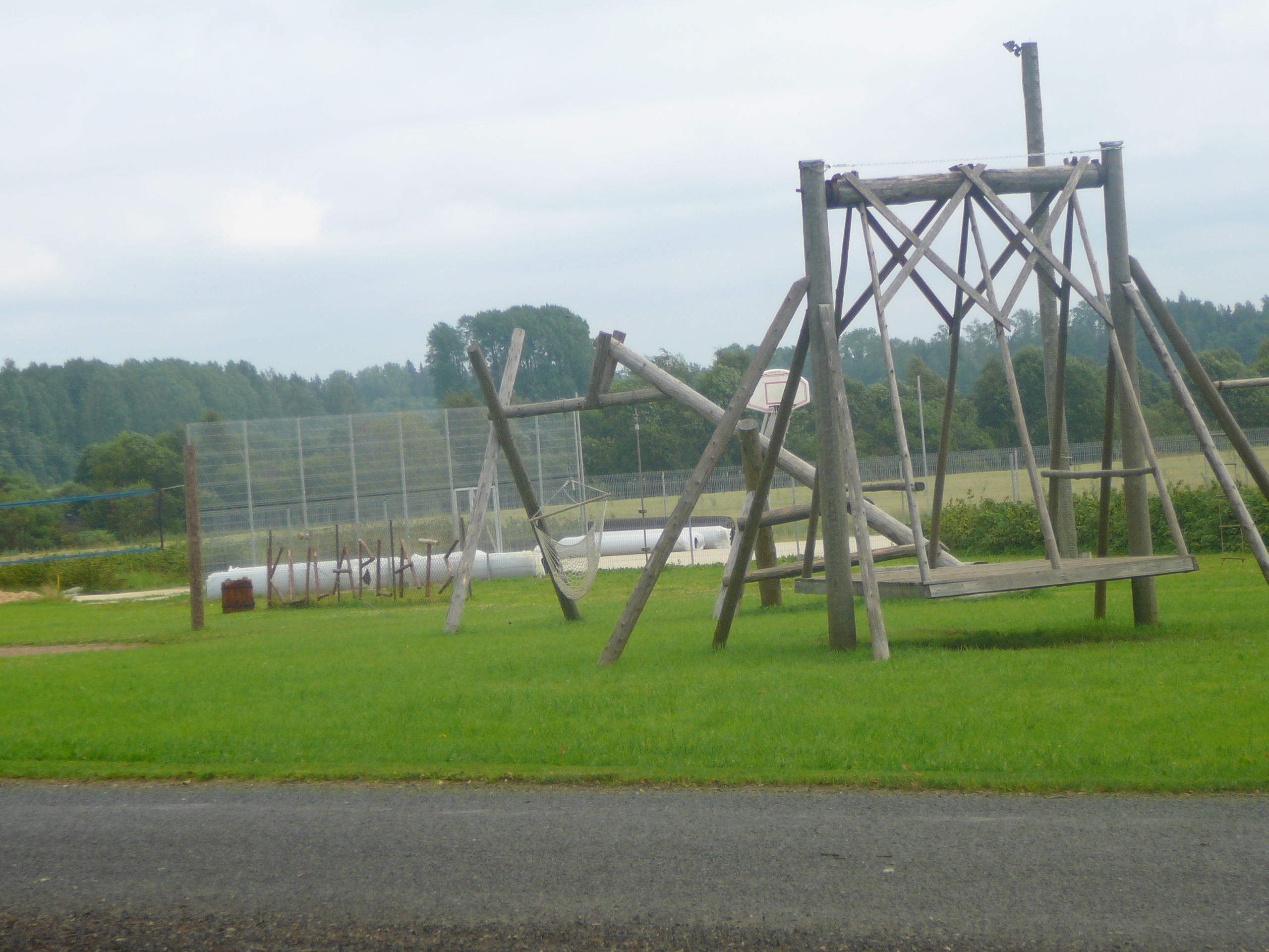 Vaade Kaavere külaplatsile